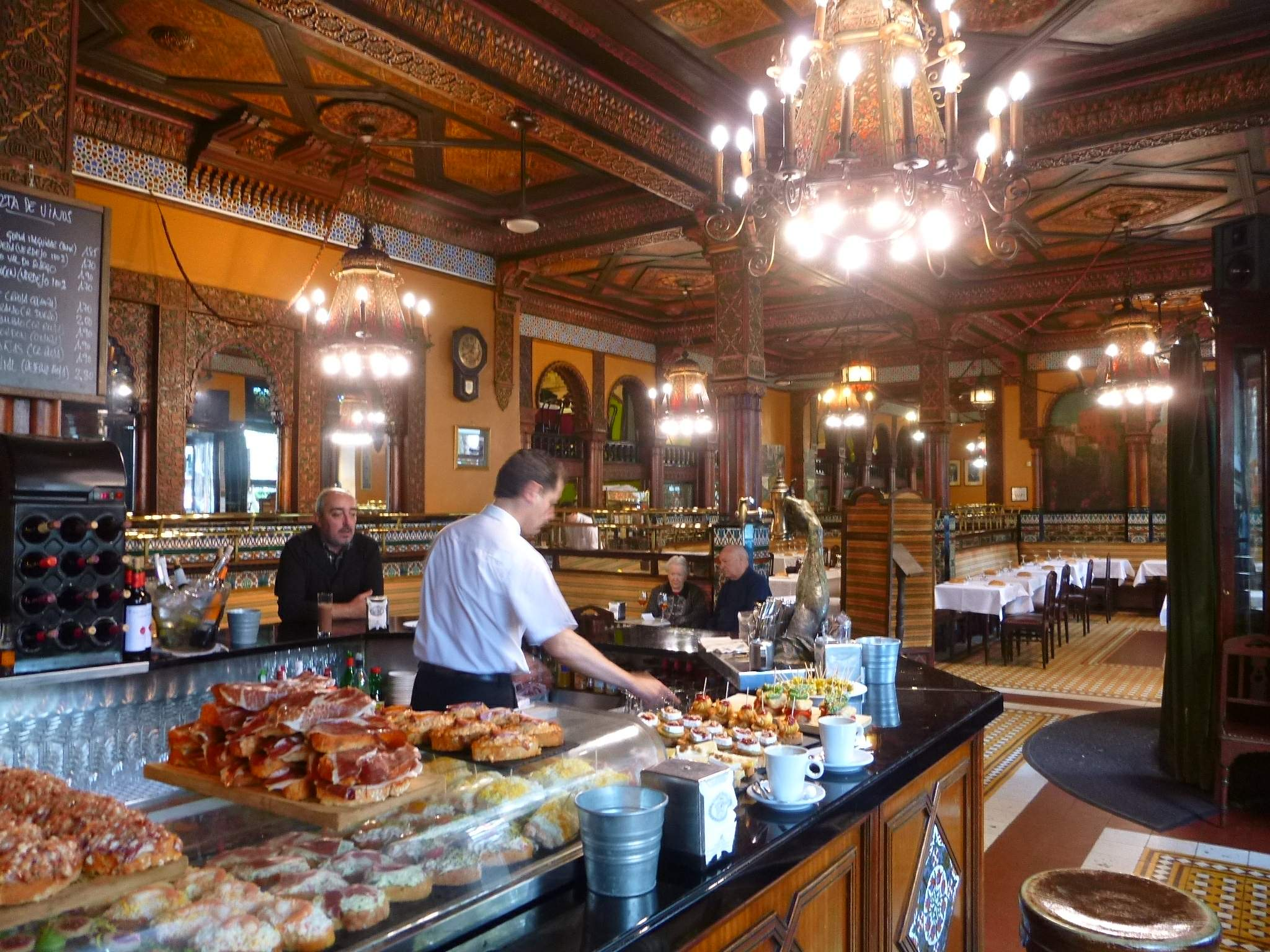 Bilbao - Café Iruña